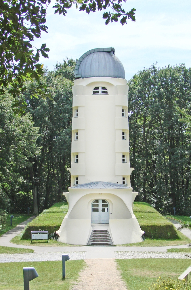 Vue de face de la tour Einstein (Einsteinturm, Einstein tower) Leibniz-Institut für Astrophysik Potsdam Allemagne Photo Annie Dalbéra Cet édifice (de style qualifié d'expressionniste) est un observatoire du rayonnement solaire doté d'un important télescope et d'appareils de spectrographie, destinés initialement à la vérification de la théorie de la relativité d'Einstein. Le bâtiment a été conçu par l'architecte allemand Erich Mendelsohn, et construit entre 1920 et 1922. Sa mise en service date de 1924. Il a été restauré à plusieurs reprises, en 1958, 1964, 1974-1978 et 1984, il est encore utilisé de nos jours. Il est situé sur la colline Telegrafenberg au sud de Potsdam dans le parc de l'observatoire. Erich Mendelsohn (1887-1953) est un des plus importants architectes allemands du XXè siècle. Il a notamment construit la Columbus-Haus, sur le Potsdamer Platz entre 1930 et 1932, un immeuble de bureaux et de commerces de 9 étages, très moderne pour l'époque. Incendié lors du soulèvement populaire de juin 1953 en RDA, il a été détruit en 1961. Erich Mendelsohn a du fuir l'Allemagne en 1933 pour échapper aux persécutions des nazis envers les juifs. Il a émigré d'abord au Royaume-Uni, puis en Palestine pour se fixer aux USA en 1941. Article de Wikipedia sur l'architecte